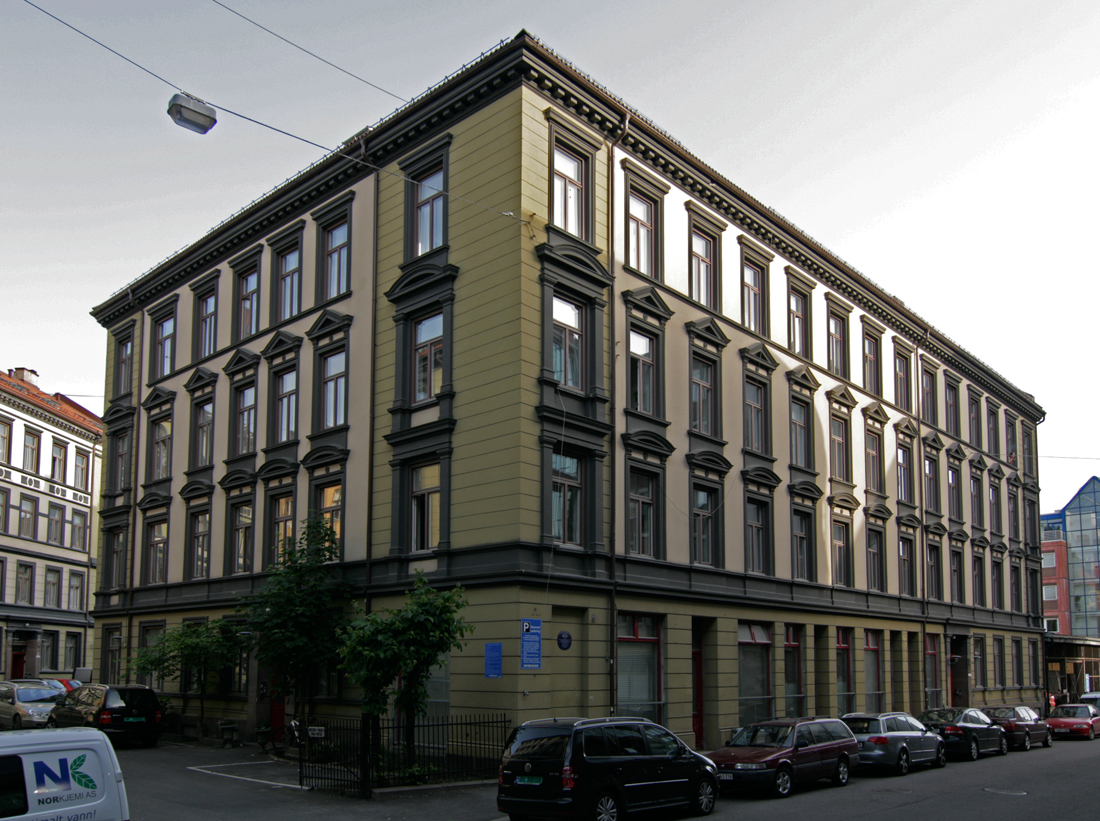 Hollendergata 2, Oslo. Bygd 1899; arkitekt Herman Backer.